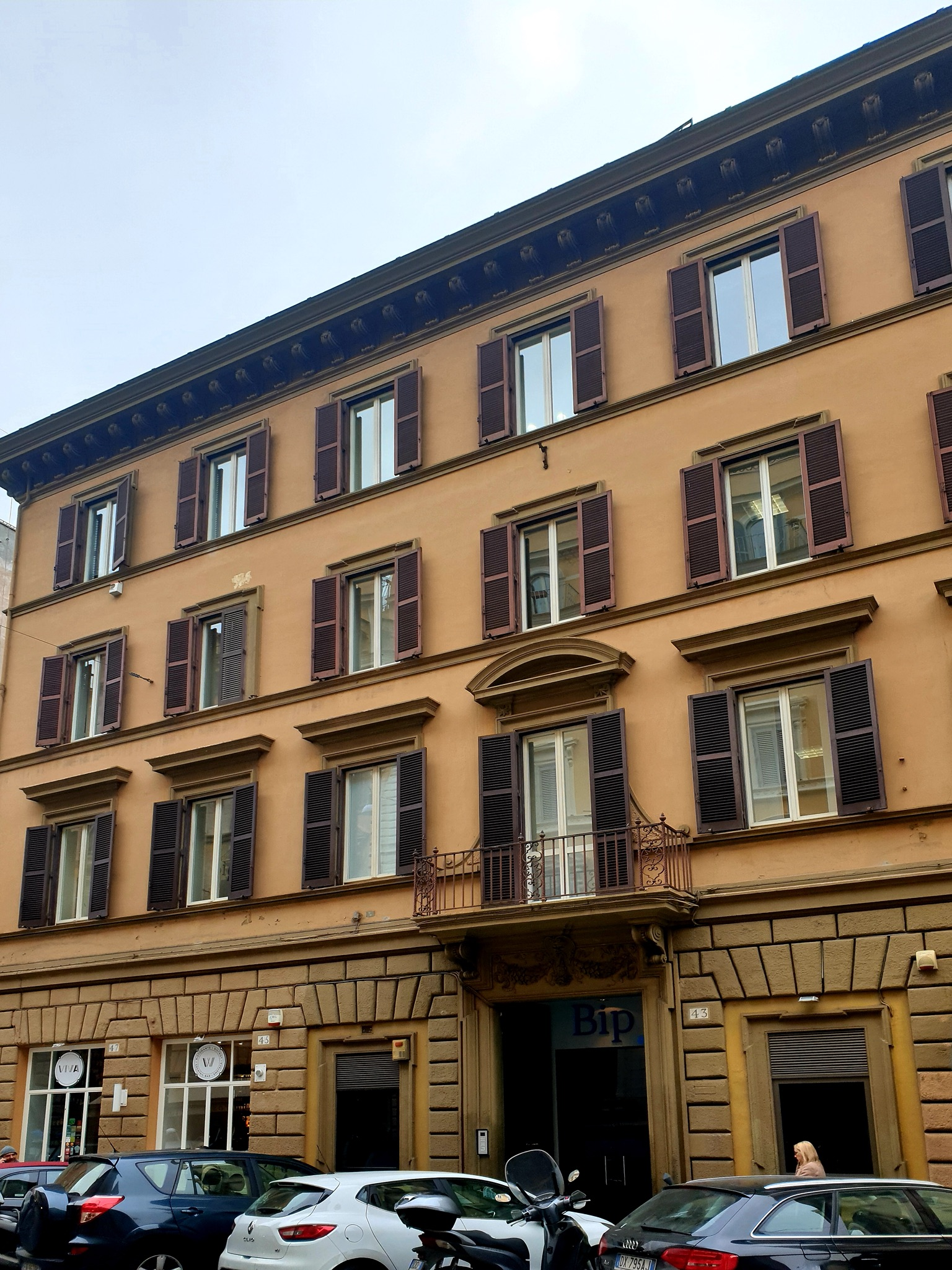 Sede principale di Business integration partners (Bip), società italiana, multinazionale, di consulenza a Roma, Via Sicilia, 43